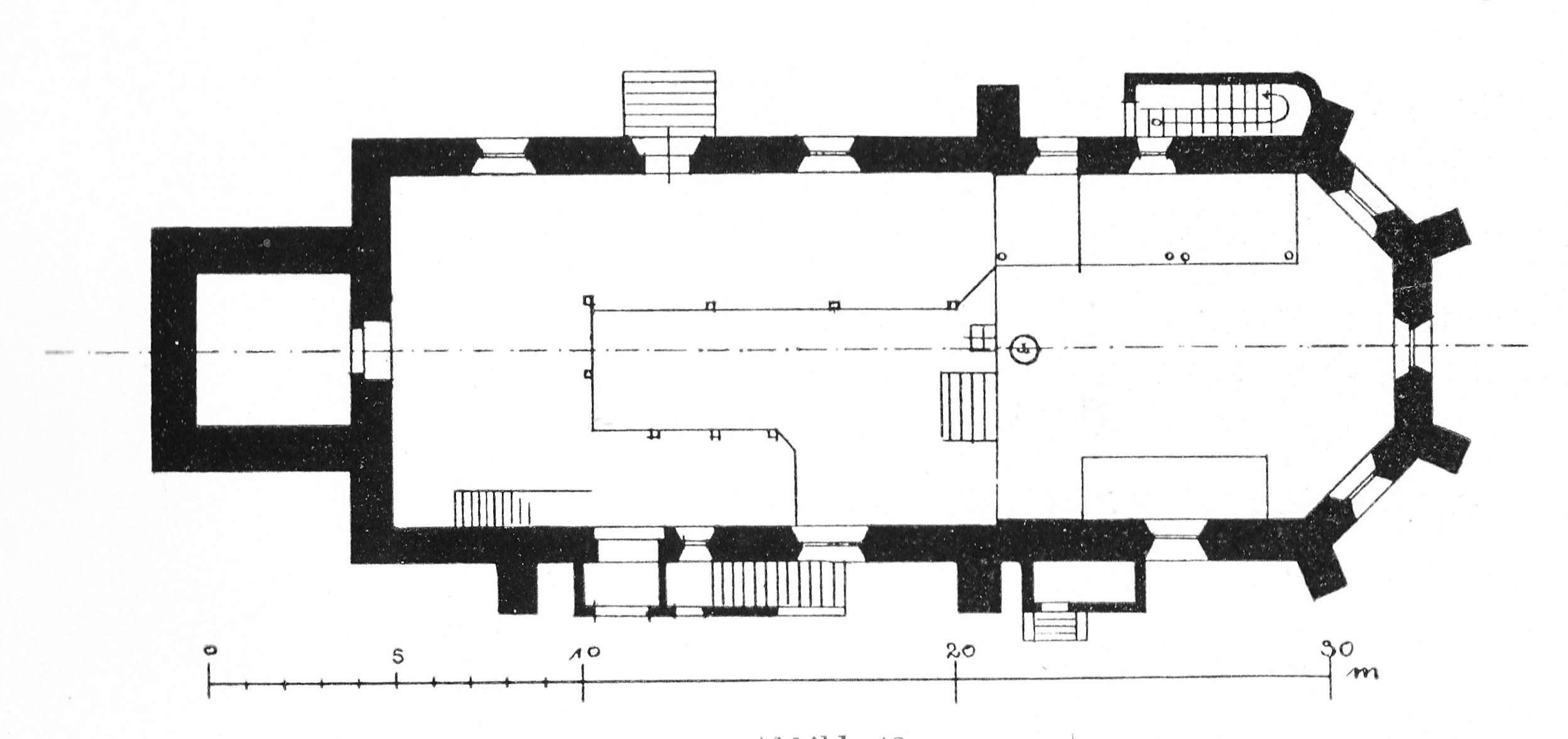 Grundriss der ev. Kirche St. Ulrich in Rastede (Nierdersachsen), Zustand 1907